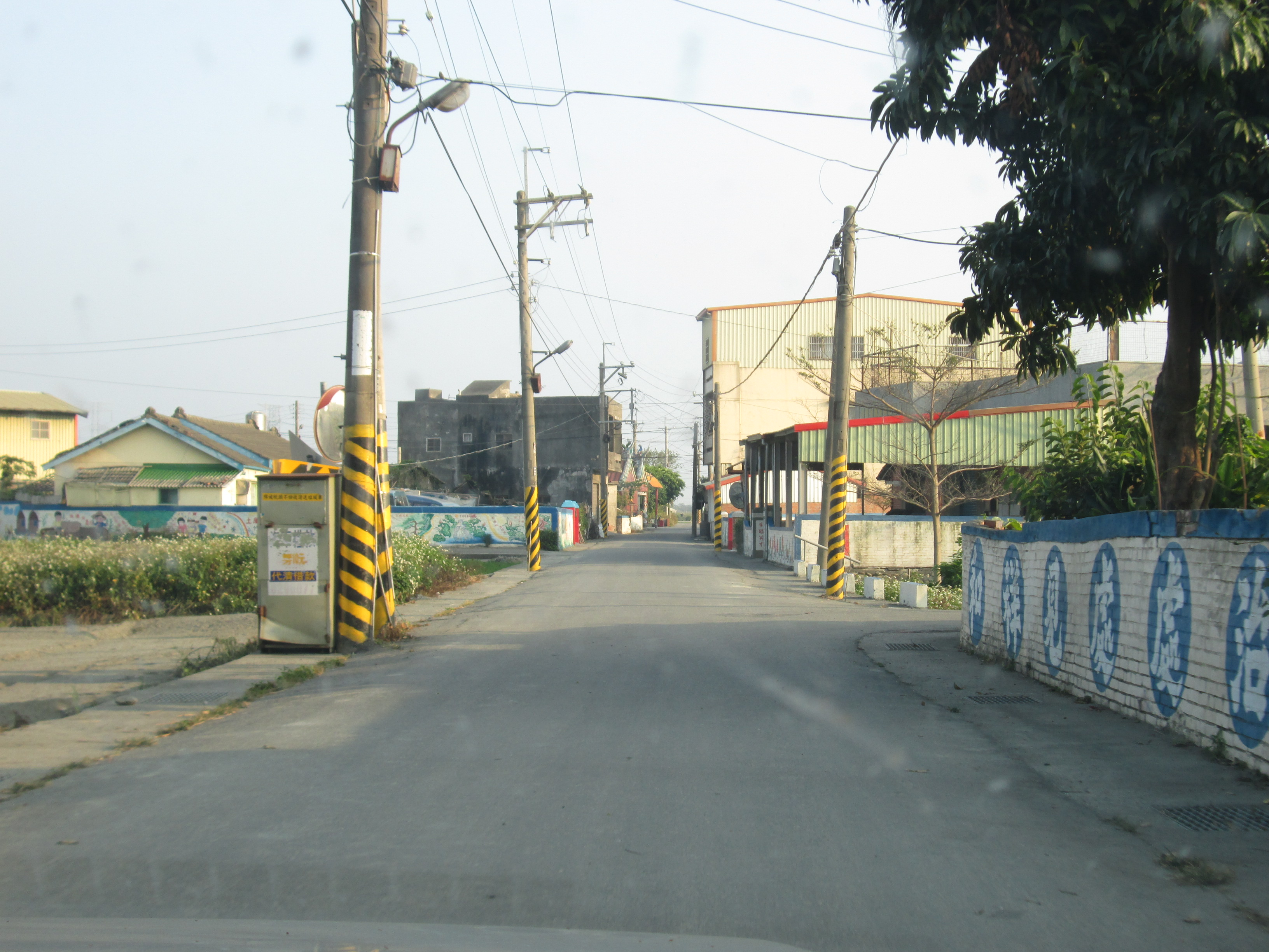 彰化縣竹塘鄉 土庫